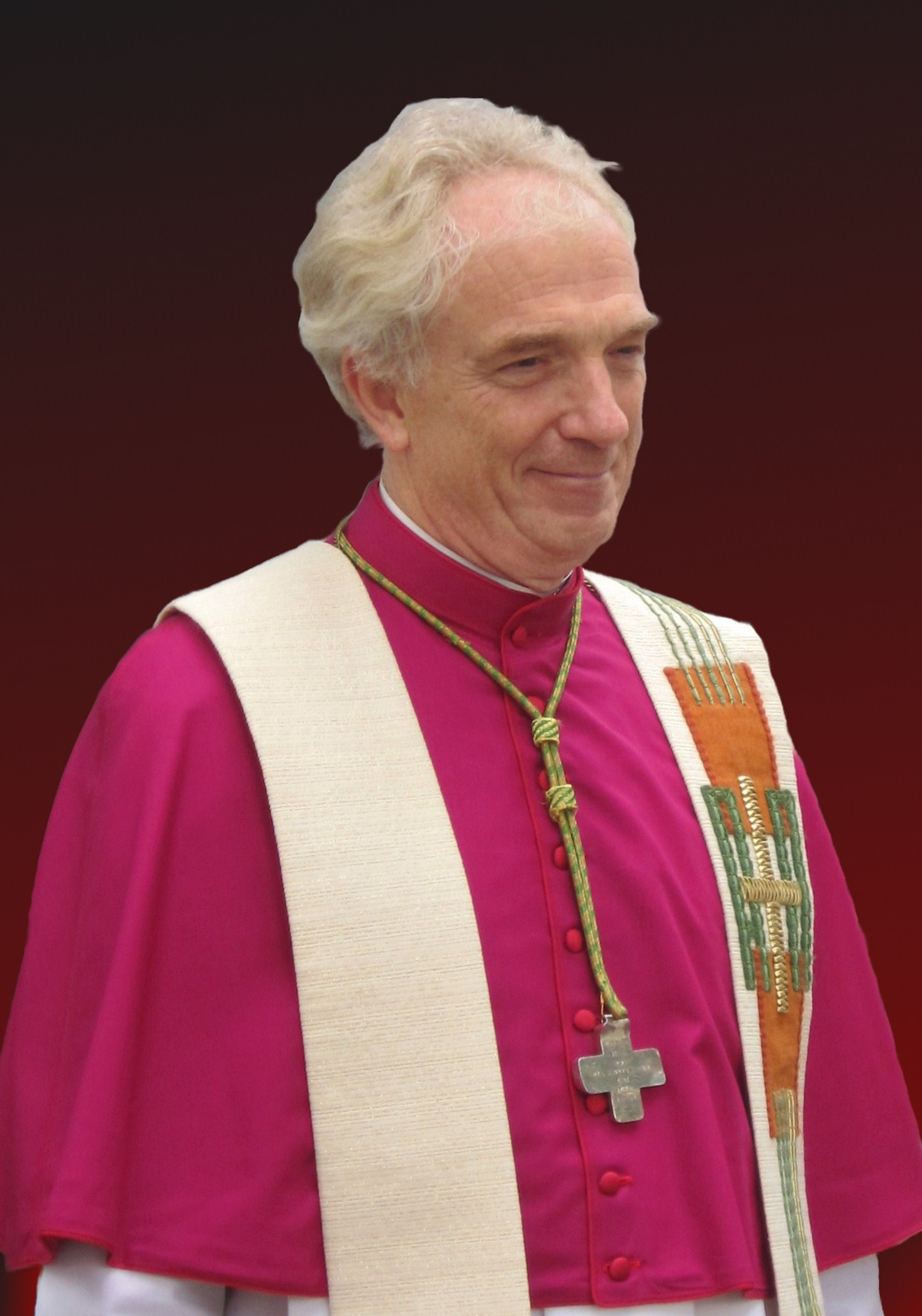 Joris Vercammen - starokatolicki arcybiskup Utrechtu.